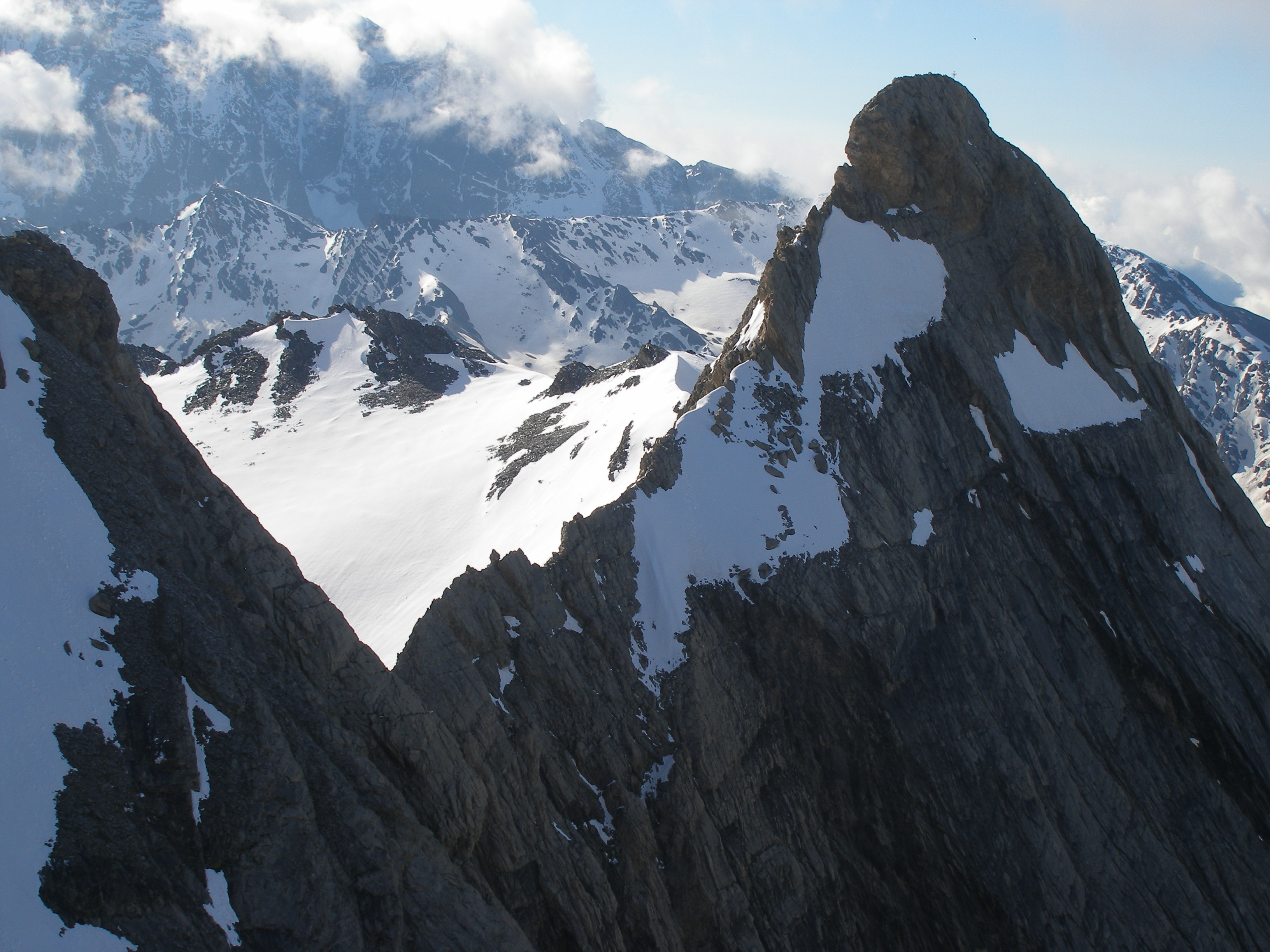 Il Pic d'Asti visto dalla vetta del Pan di Zucchero. Sullo sfondo il Monviso.